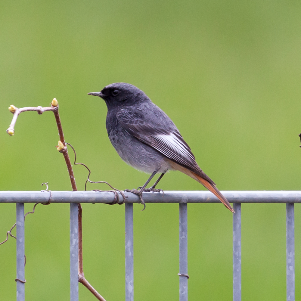 Phoenicurus ochruros, Hausrotschwanz, Männchen. Göppingen, Baden-Württemberg, Deutschland.